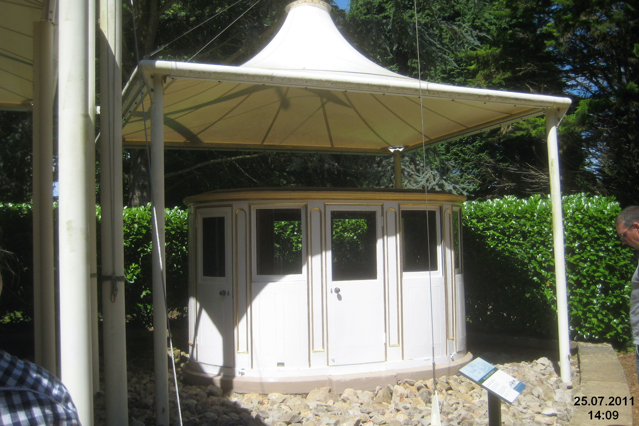 Osborne House Gardens